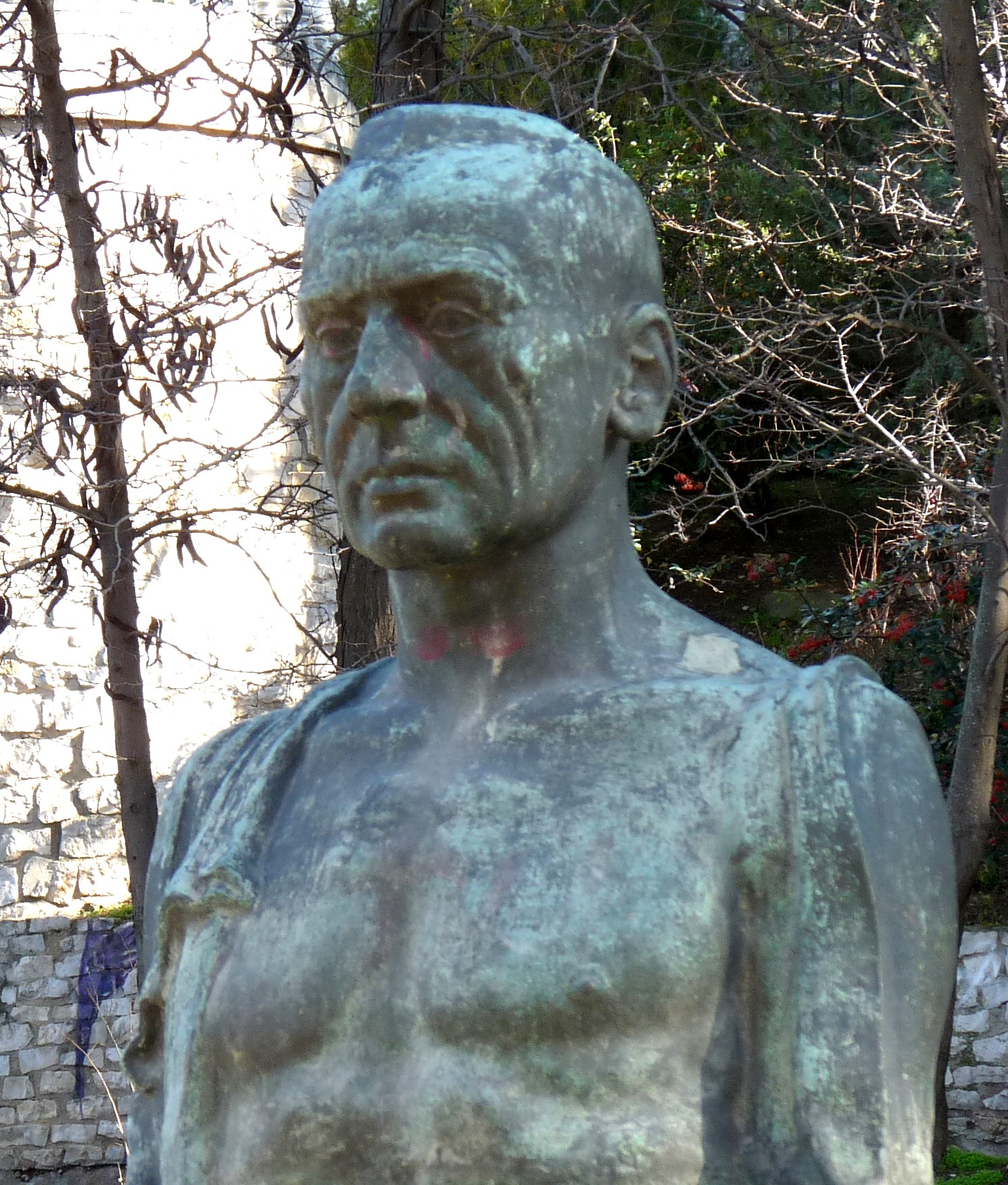 Zaragoza - Monumento a Joaquín Dicenta en el Parque Grande